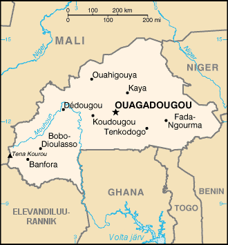 Burkina Faso kaart